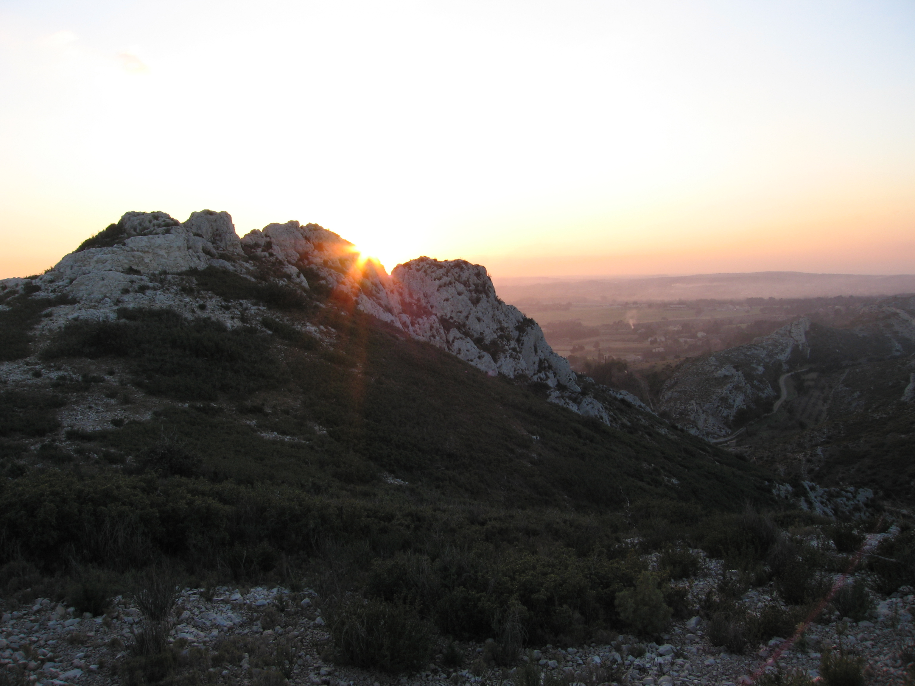 Coucher de soleil sur les Alpilles